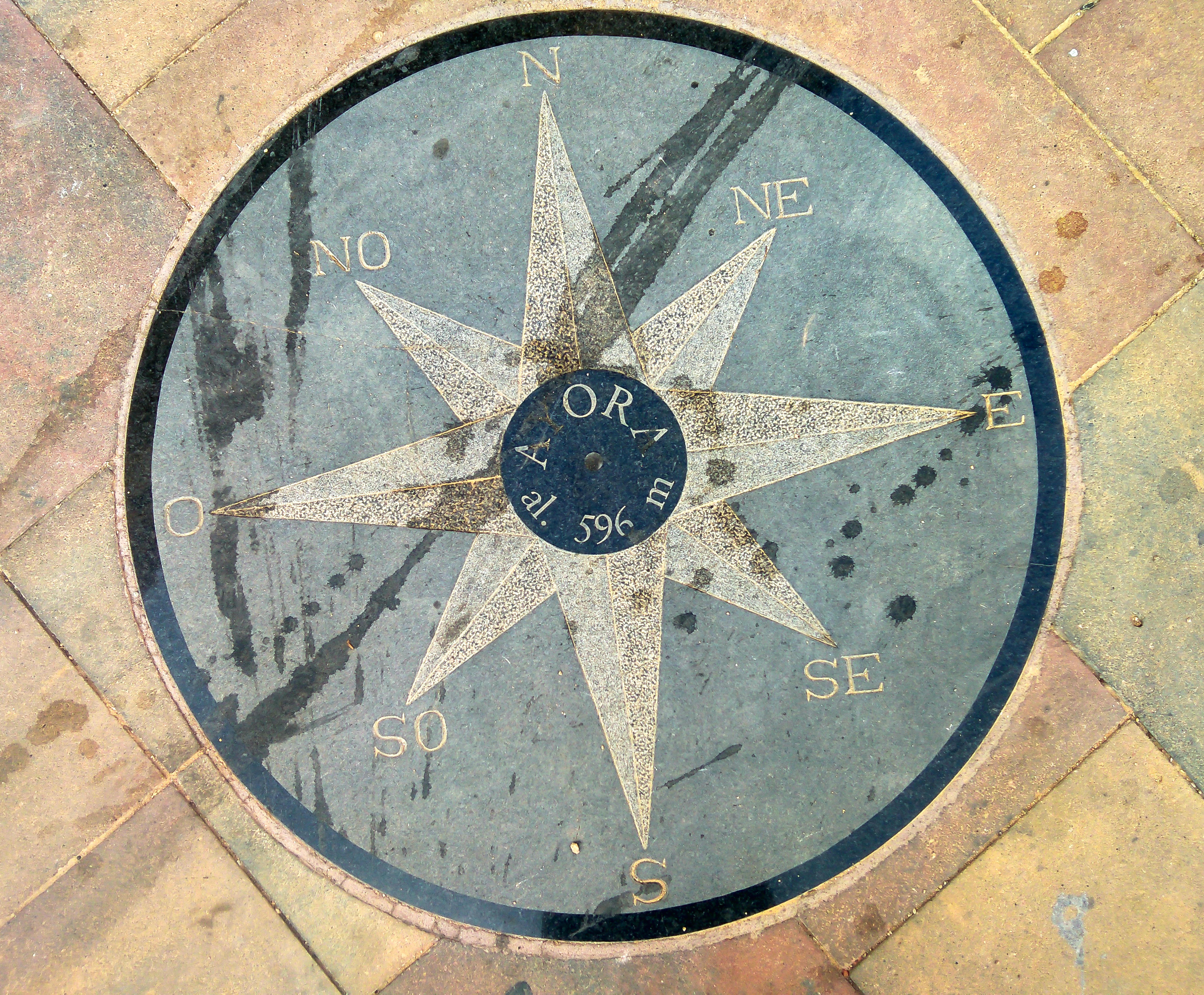 Altitud de Ayora: 596 m s. n. m. ( metros sobre el nivel del mar).